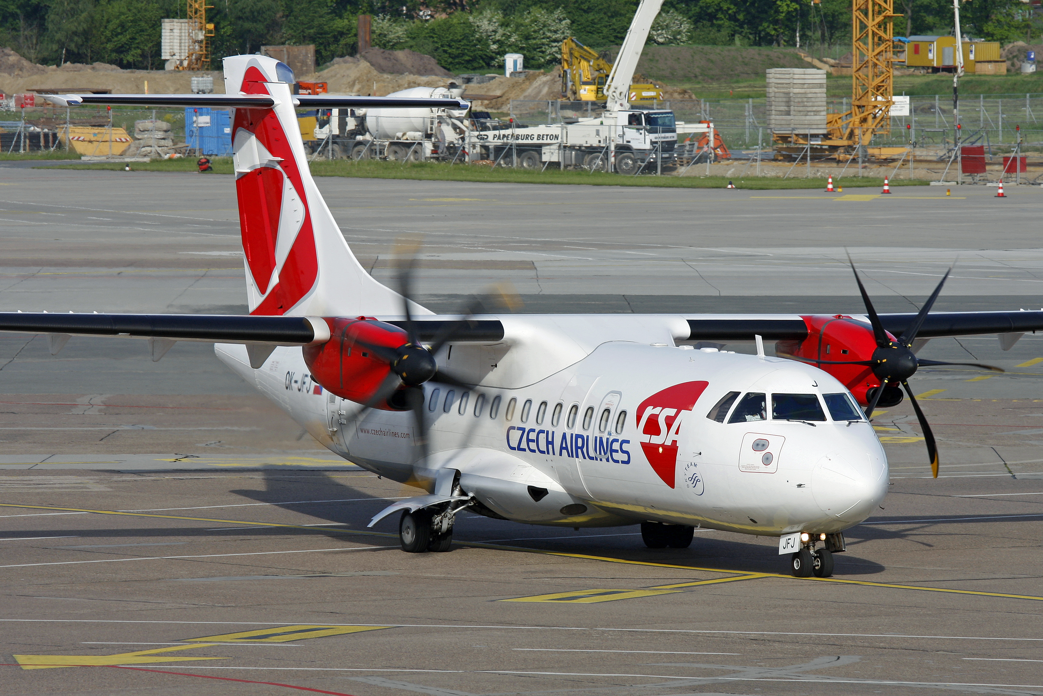 Haj / Eddv 09-05-09